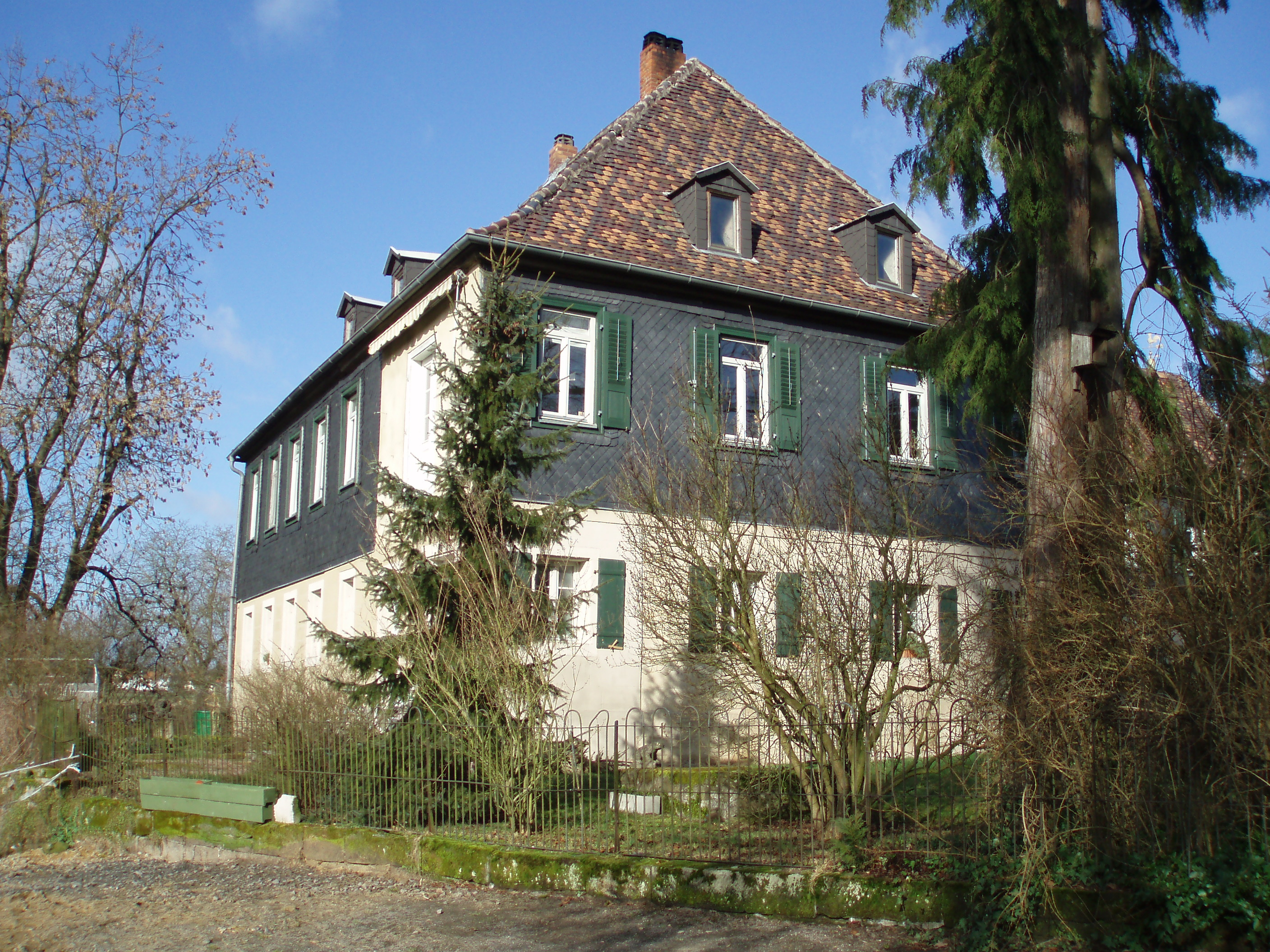 Schloss Eichhof, Dörfles bei Scheuerfeld, Coburg: Nebengebäude